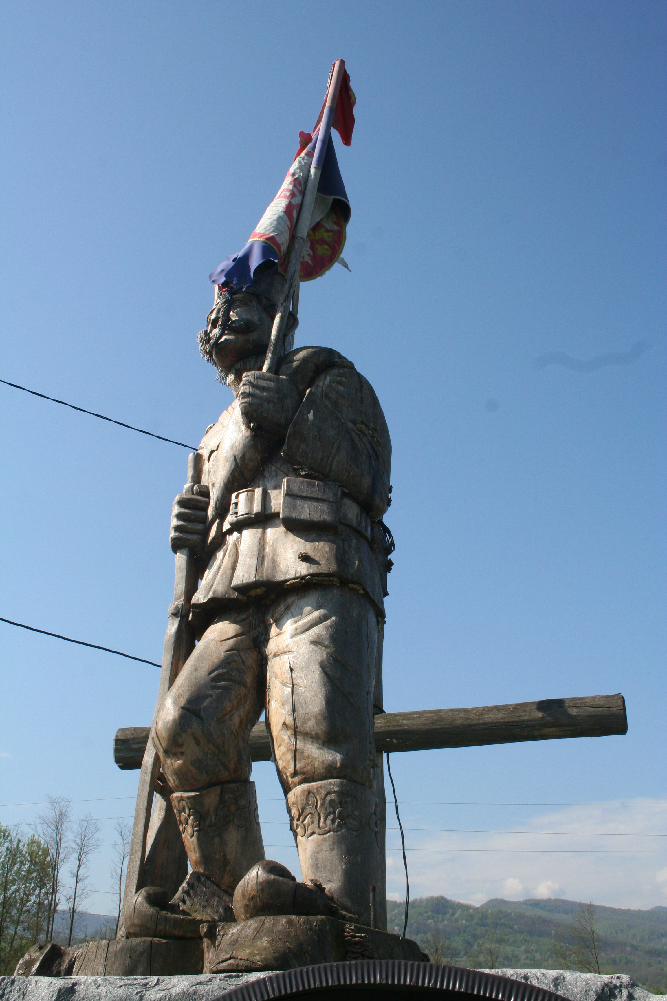 Spomen kompleks ratnicima 1914-1918. Ljubovija